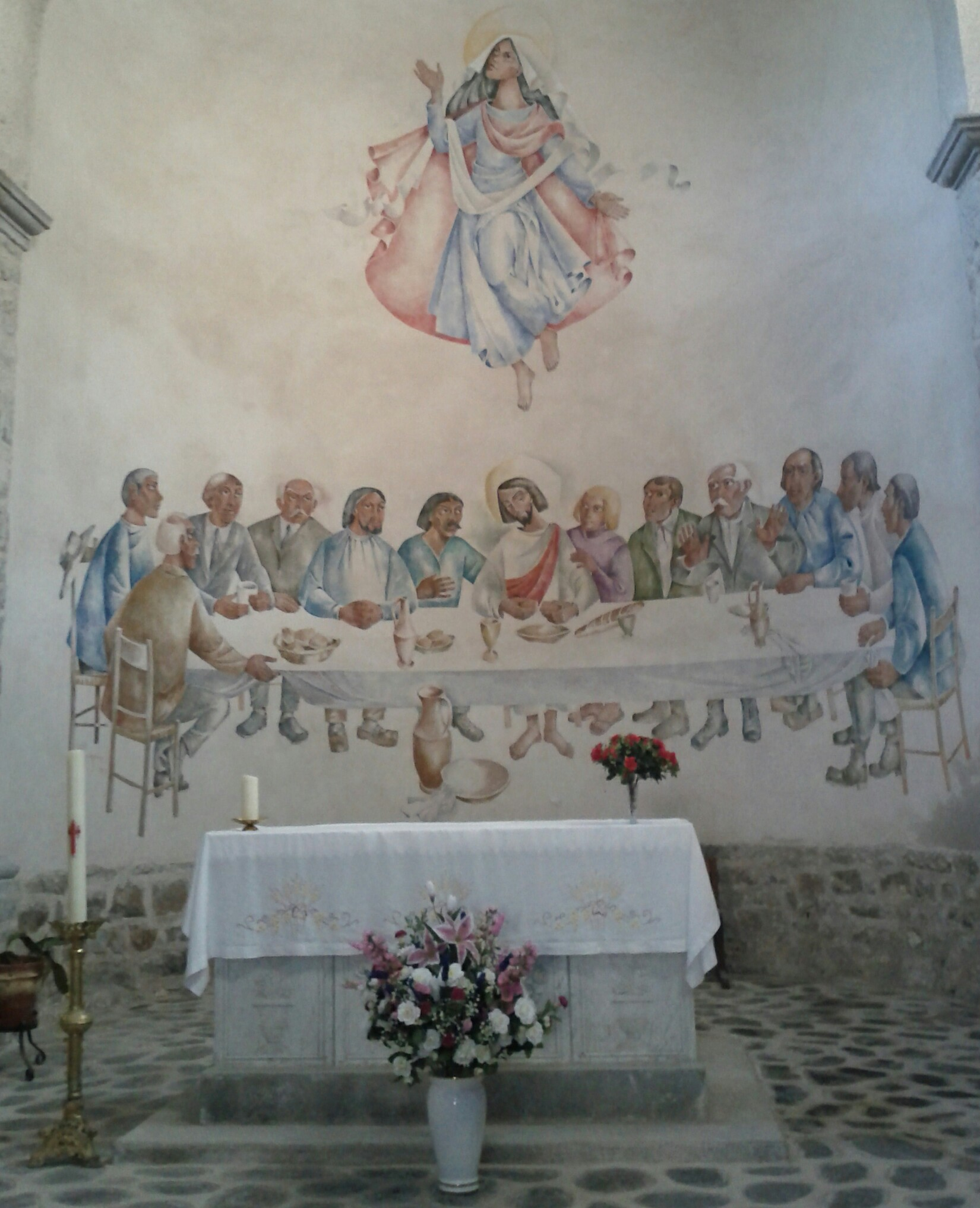 Réalisée par un peintre hollandais, elle représente l'Assomption de la Vierge et la Cène avec des hommes du village.